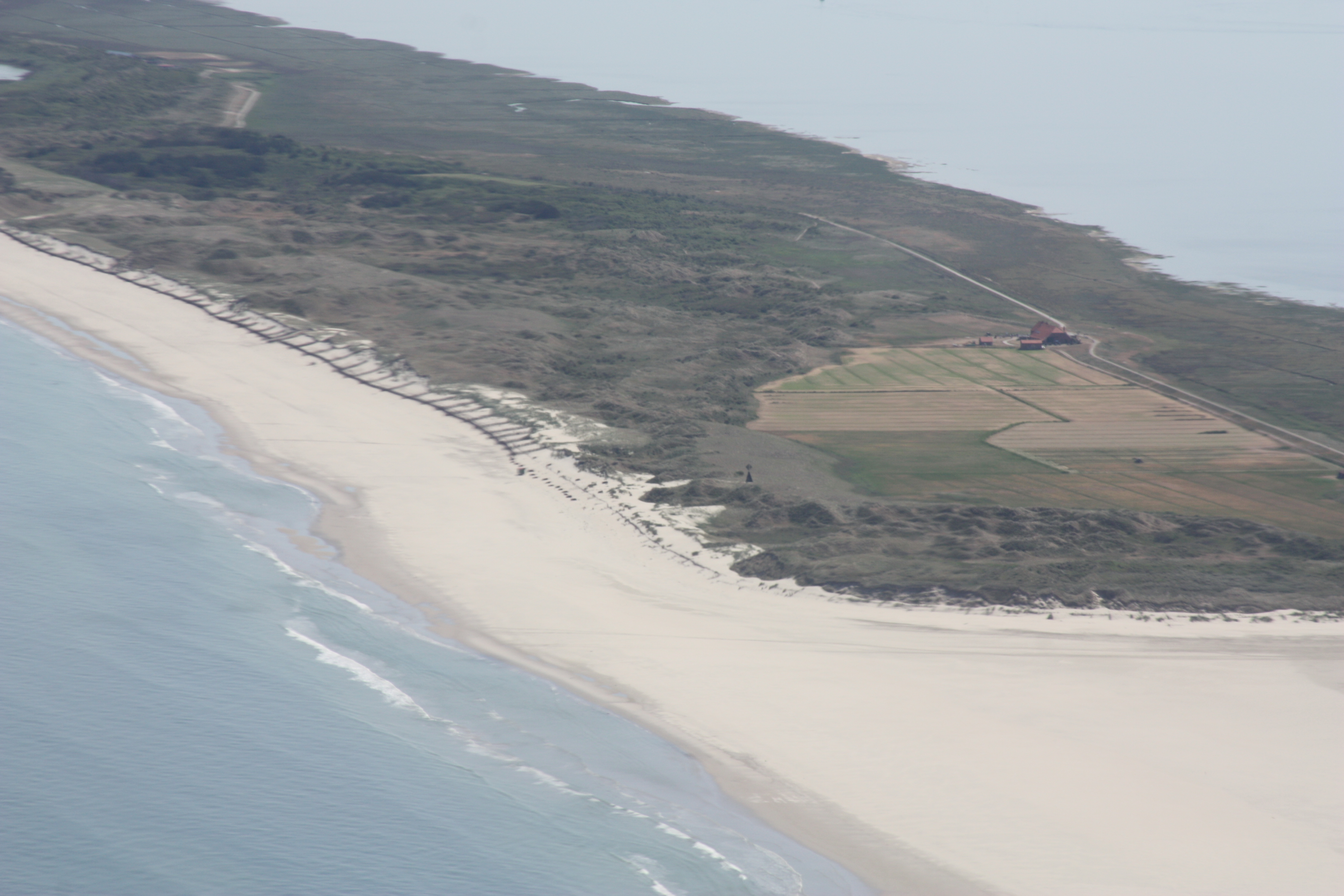 Flug über Juist - von Borkum kommend, zuerst am Nordstrand entlang; Flughöhe 500 m = 1500 ft; Juli 2010